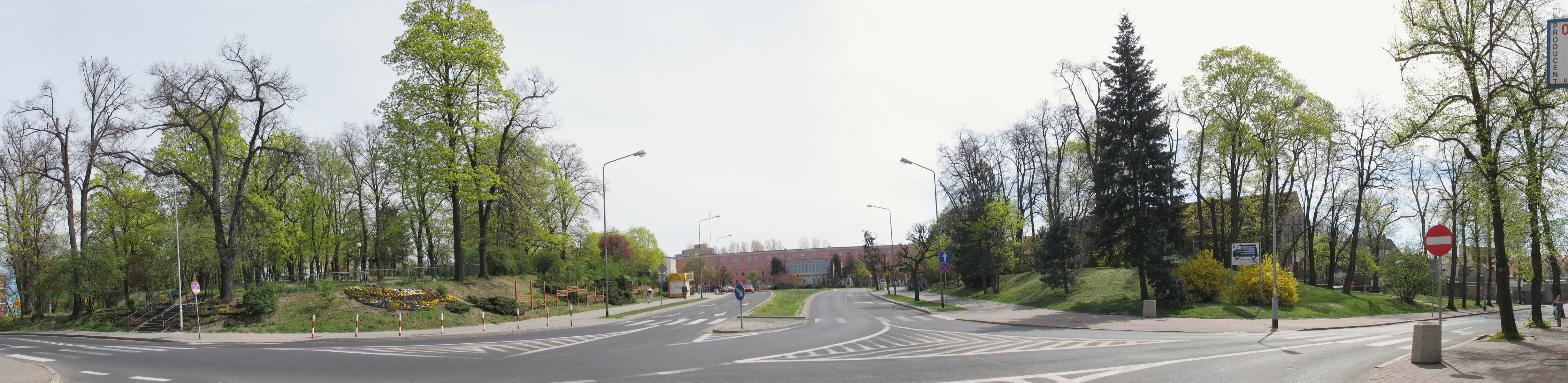 Plac J.Piłsudskiego w Zielonej Górze - efekt przecięcia dawnego cmentarza (Gruner Kreutz Friedhof) ulicą (wówczas ulicą Małgorzaty Fornalskiej) Autor: Mohylek 11:55, 17 April 2007 (UTC)